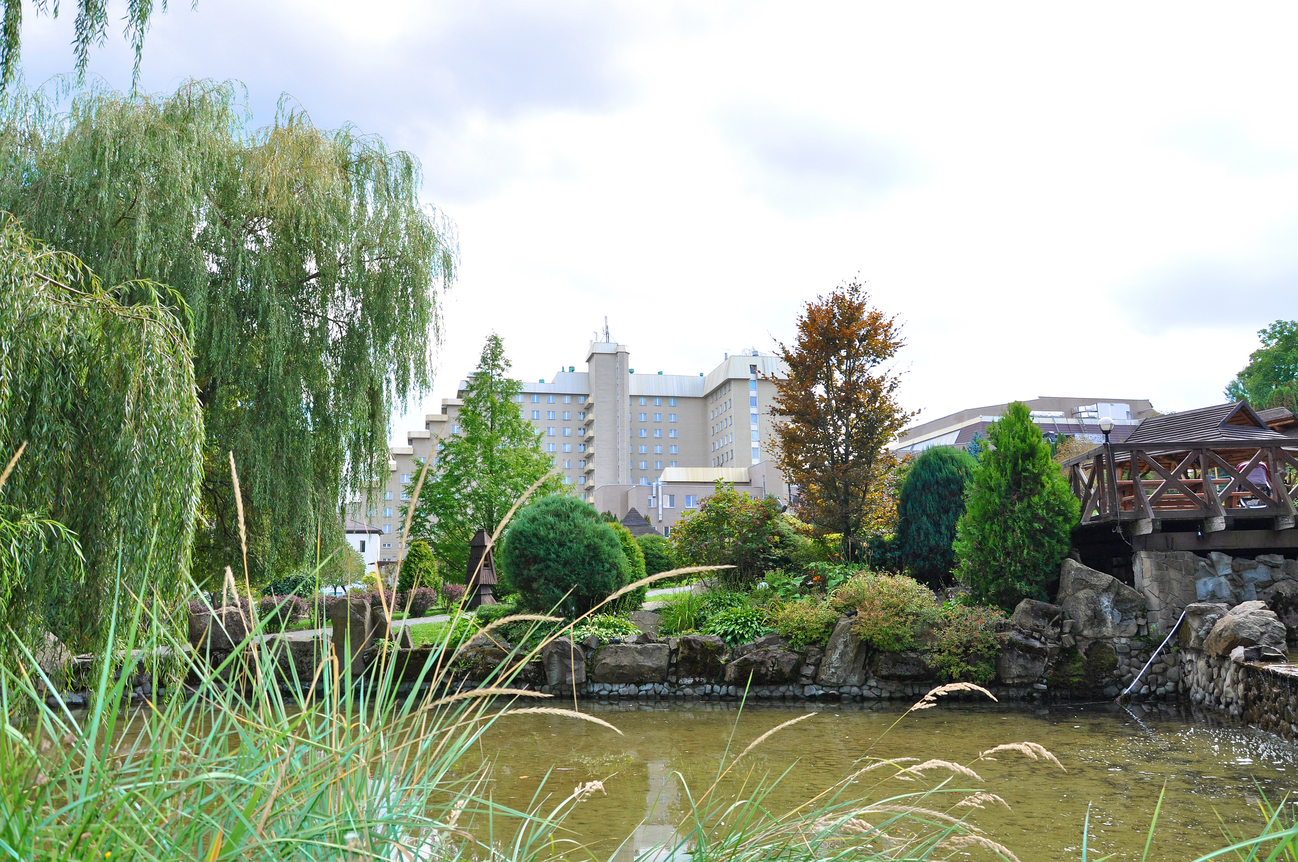 Санаторій Карпати у Трускавці - територія (ландшафтний парк "Підгір'я"), боковий вигляд на фасад готелю